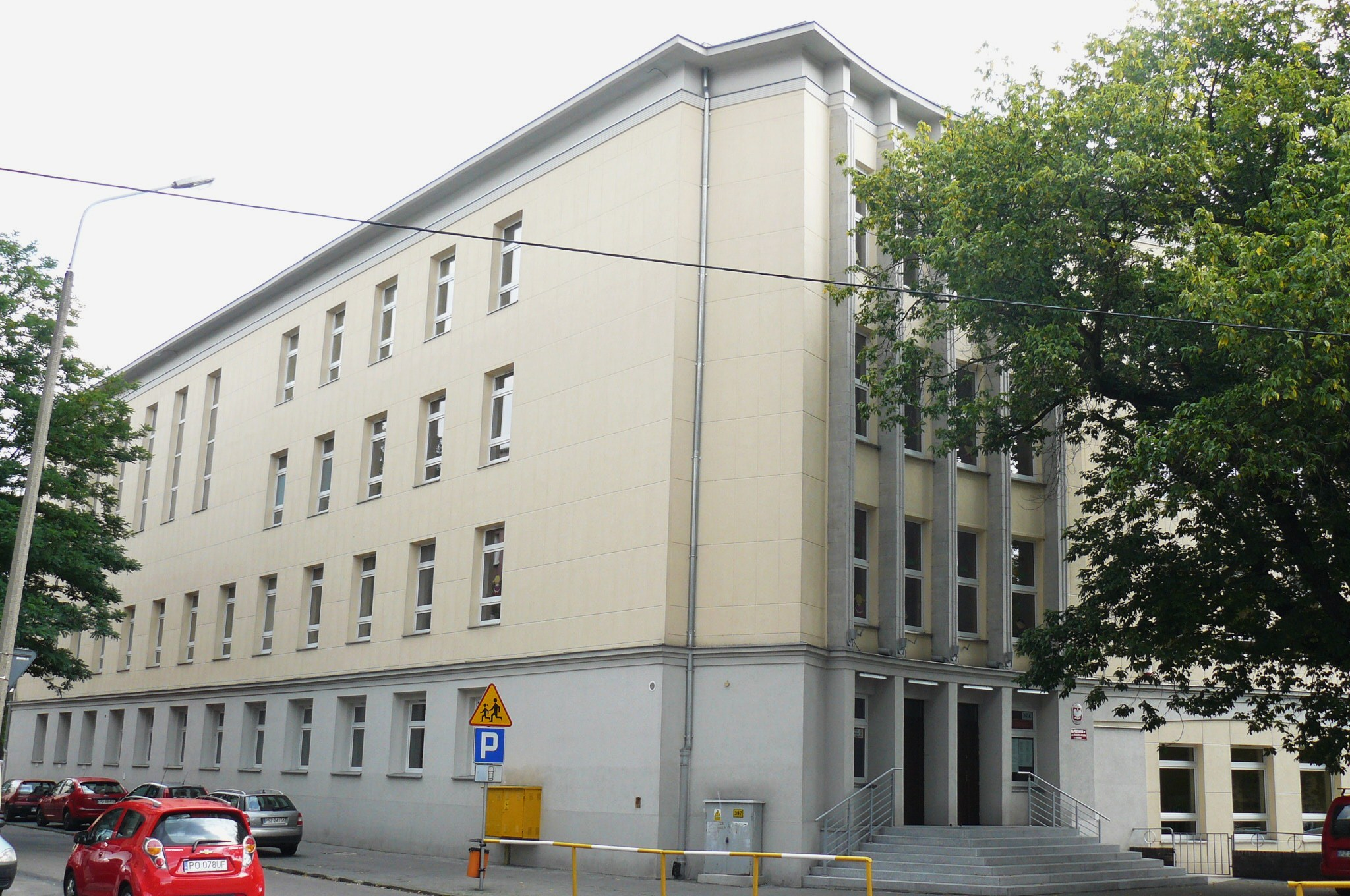 Szkoła przy ul. Łukaszewicza w Poznaniu.